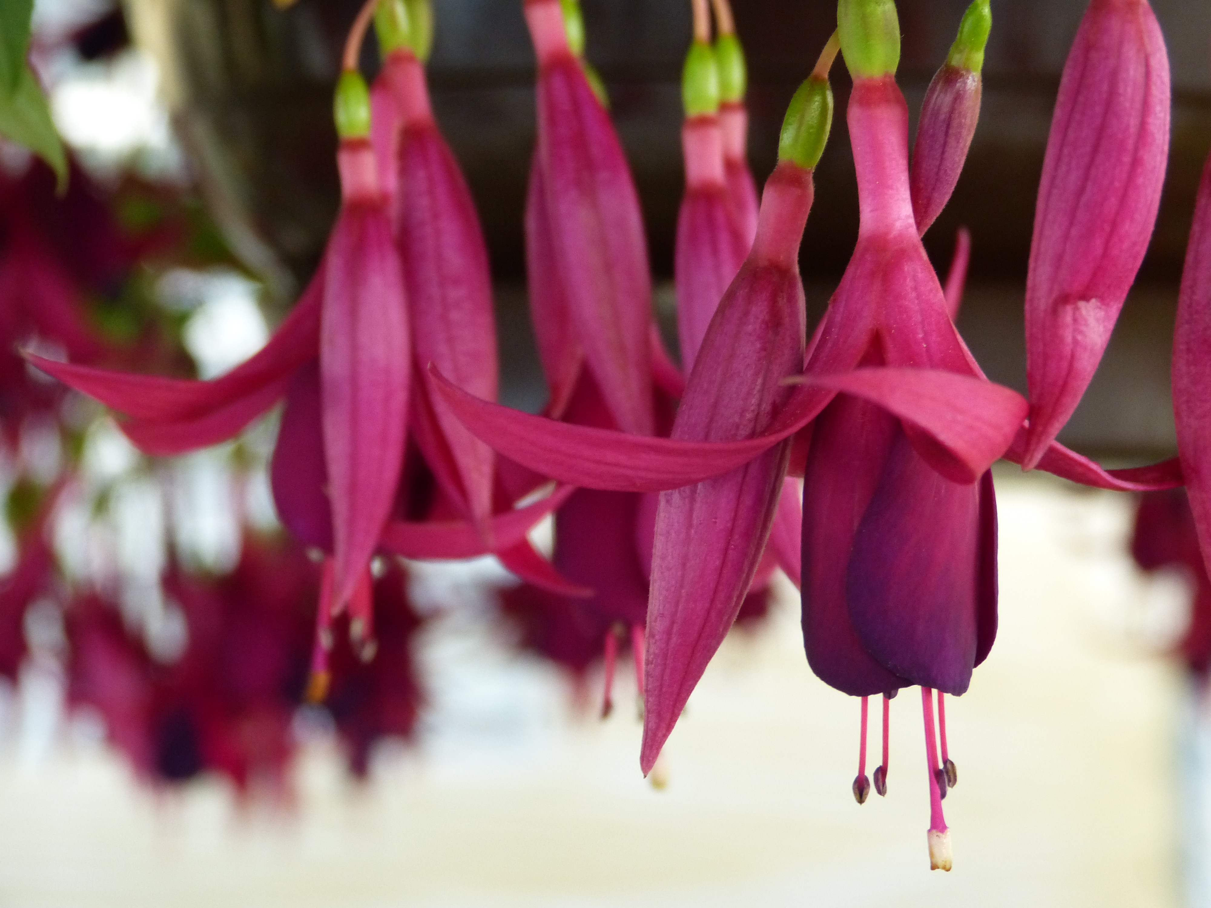 Fuchsien in Wemding